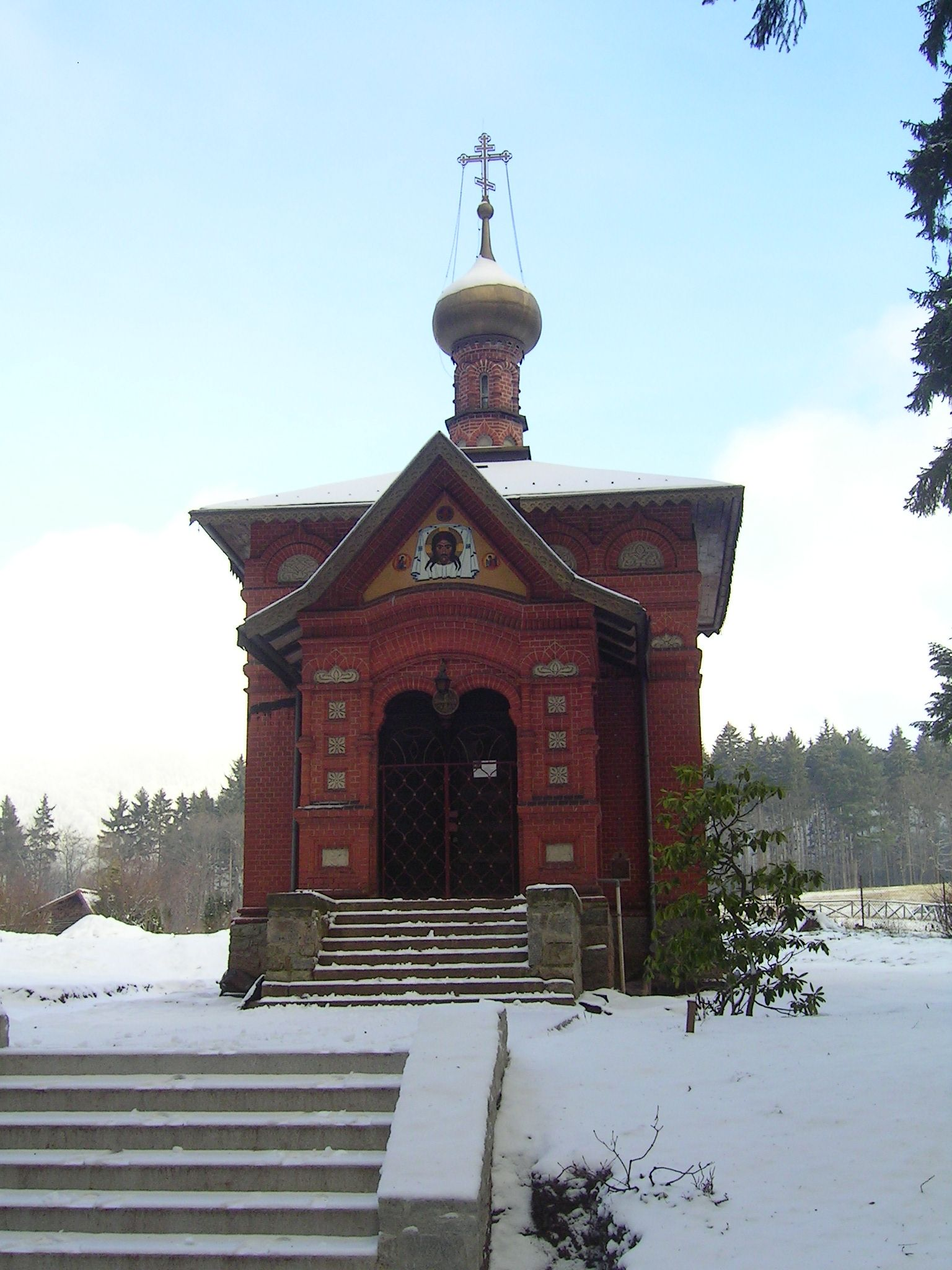 Sokołowsko - Cerkiew św. Michała Archanioła widok od frontu autor: Radwa